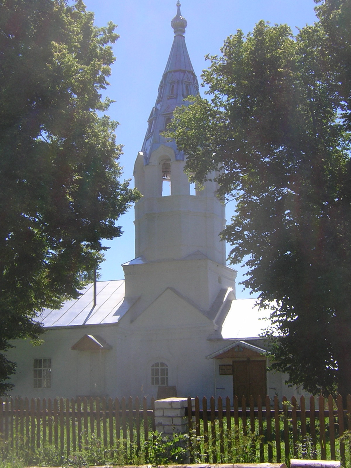 Krasnoarmejskoe Village, St. Mikhail Church. Russia, Ivanovo region, near Shuya. Село Красноармейское (б. село Михаила Архангела), Россия, Ивановская область, Шуйский район.